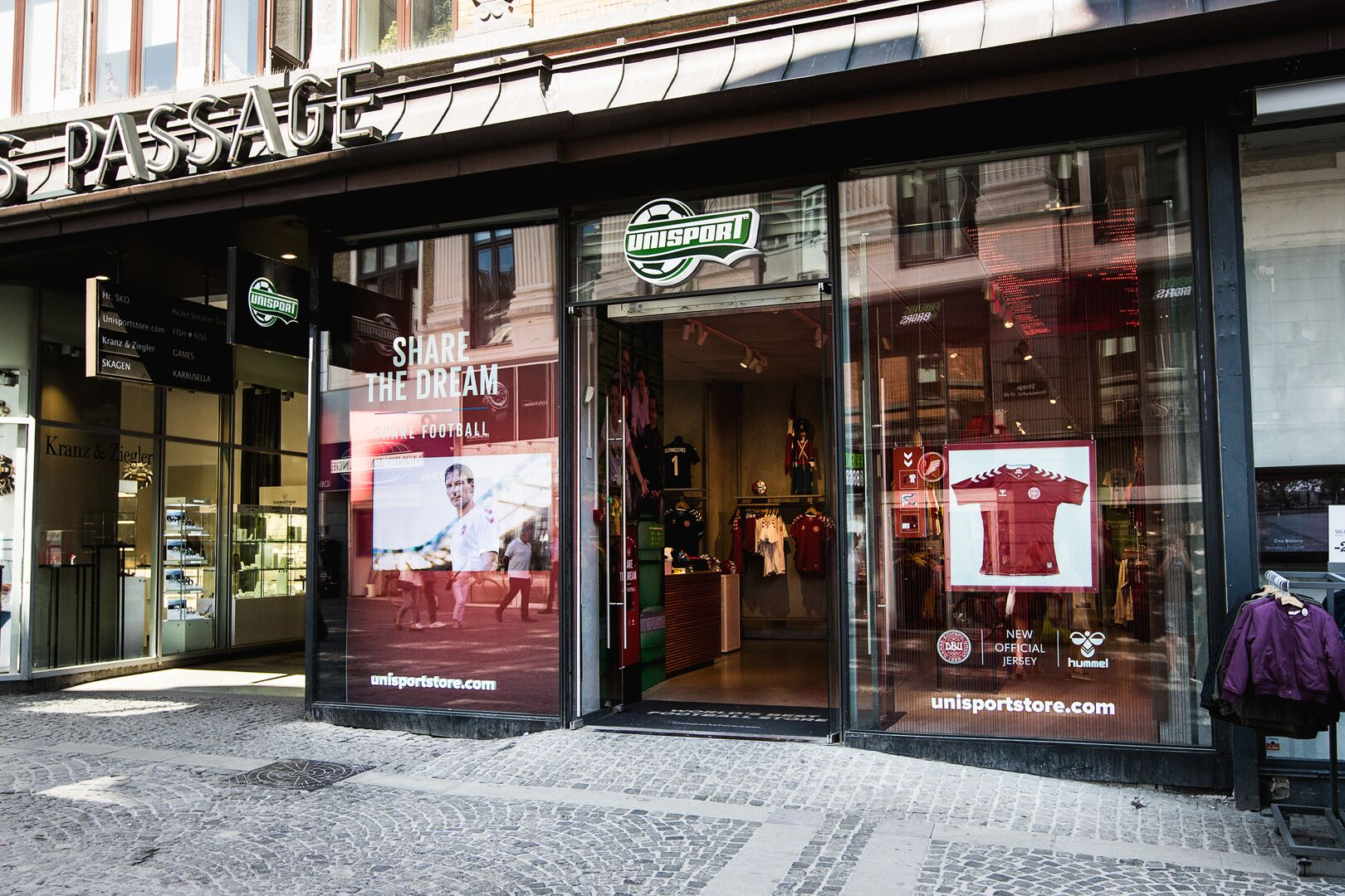 Et billede foran indgangen til Unisports butik på Vesterbrogade i København